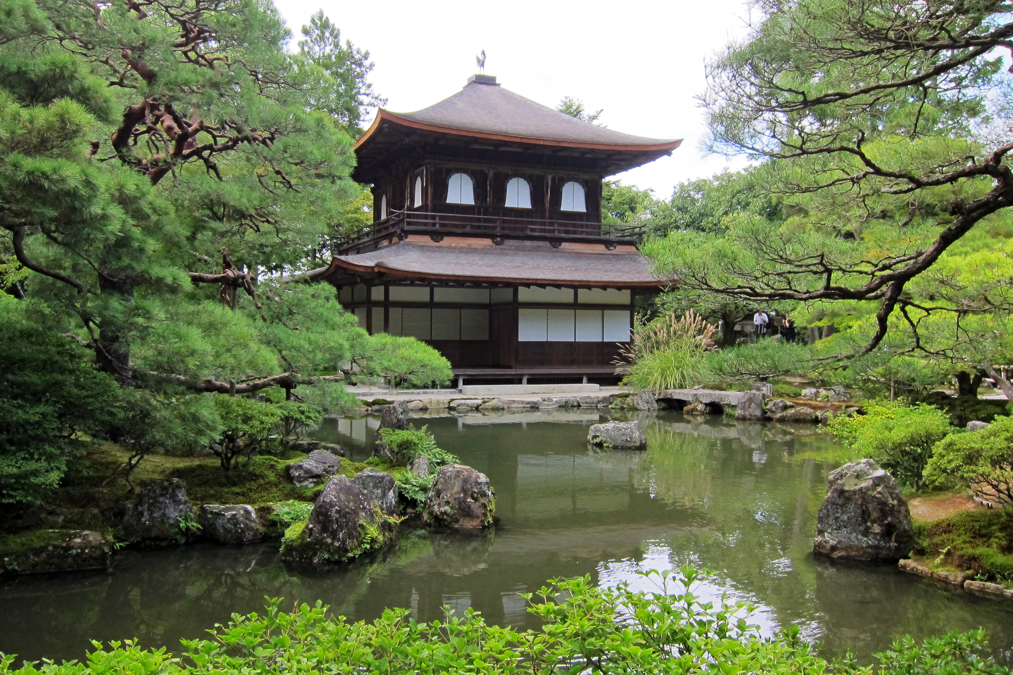 Ginkaku-ji (銀閣寺), Kyoto, Kyoto prefecture, Japan